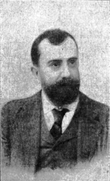 Fotografía del escritor y político Roberto Castrovido publicada en diciembre de 1911